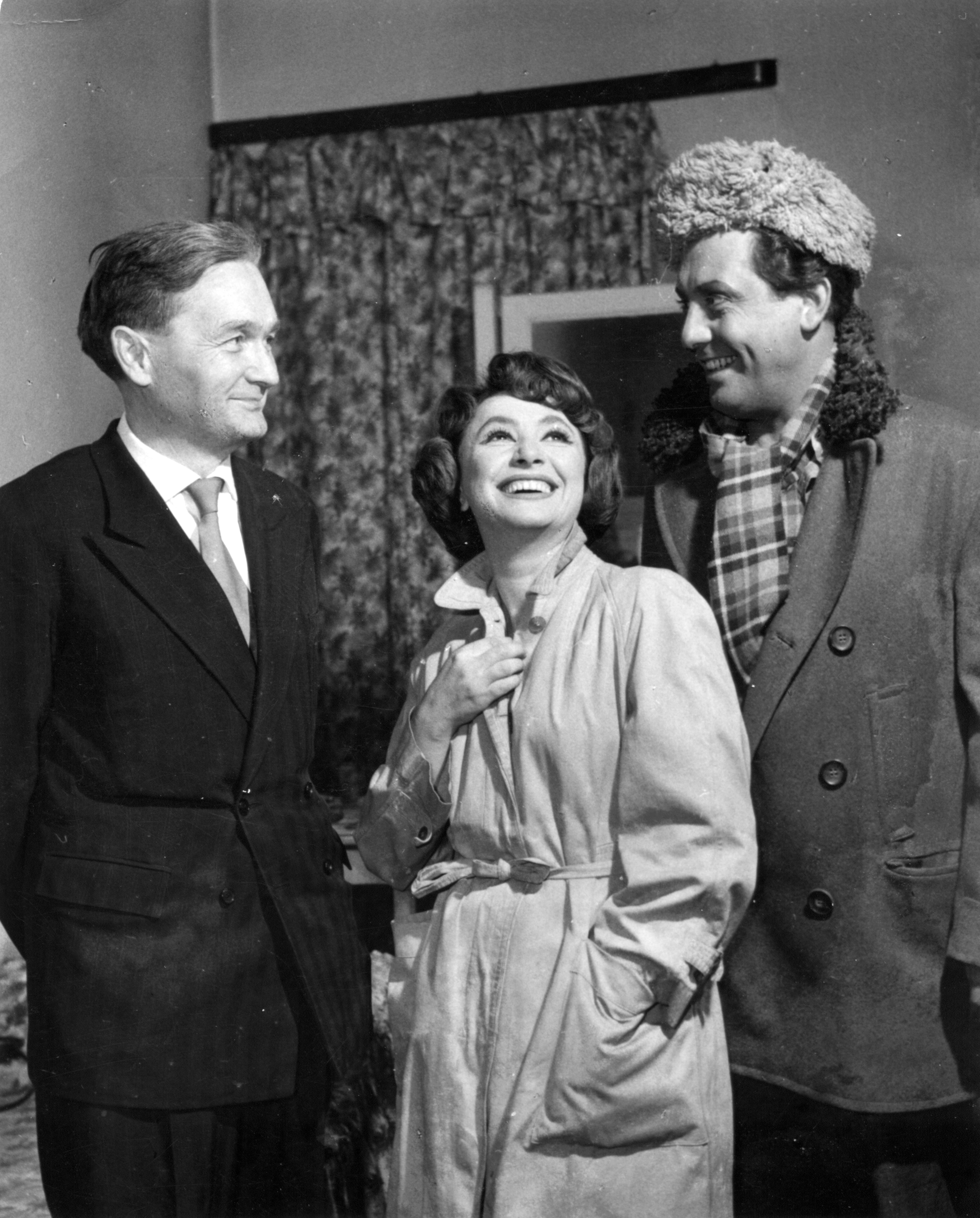 Blaha Lujza tér, a Nemzeti Színház öltözője. Arbuzov: Irkutszki történet című darabjának fordítója, Németh László író, és a darab szereplői, Berek Katalin és Kállai Ferenc színművészek.